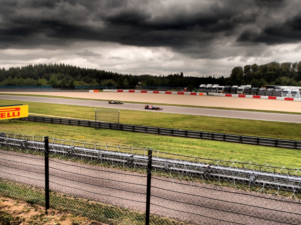 Lotus et toro rosso nurburgring 2011